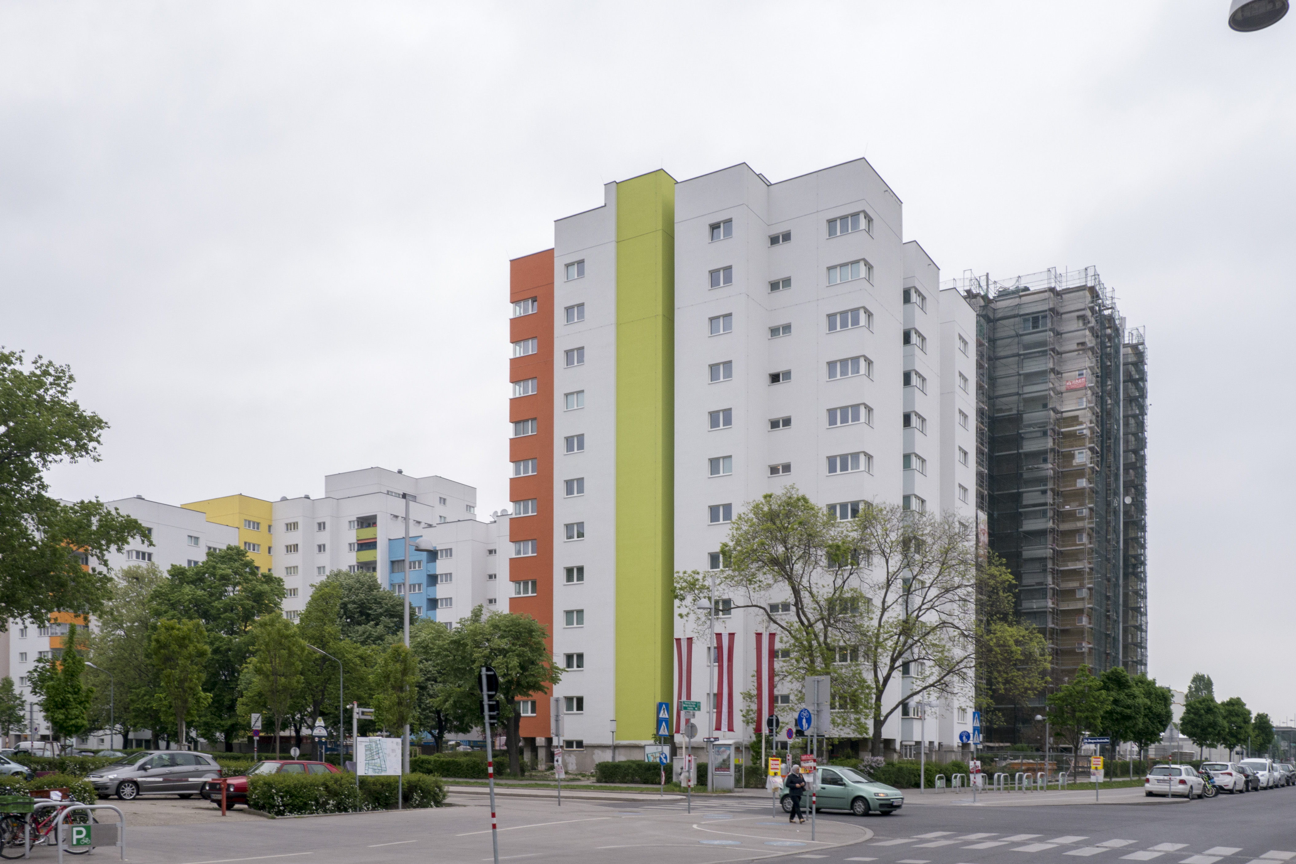 Großfeldsiedlung Pastorstraße